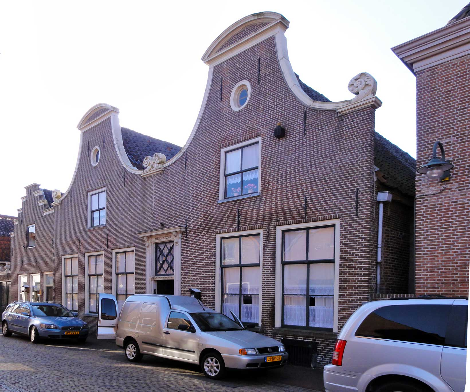 Kerkstraat 14 Vollenhove